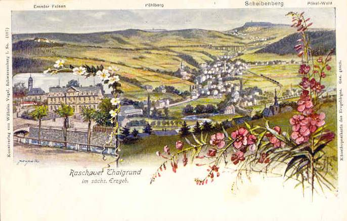 Der Raschauer Talgrund Die Karte zeigt den Blick auf Raschau aus südwestlicher Richtung. Am Horizont erhebt sich der Scheibenberg, davor lässt sich das Markersbacher Eisenbahnviadukt erkennen. In der Bildmitte befindet sich der Ortskern mit der Dorfkirche, die sich am linken Ortsrand ausmachen lässt. Im Vordergrund rechts ist die Kirche von Grünstädtel dargestellt. Der Bildausschnitt links unten zeigt den Bereich um den heutigen Markt mit Schule und Kirche.